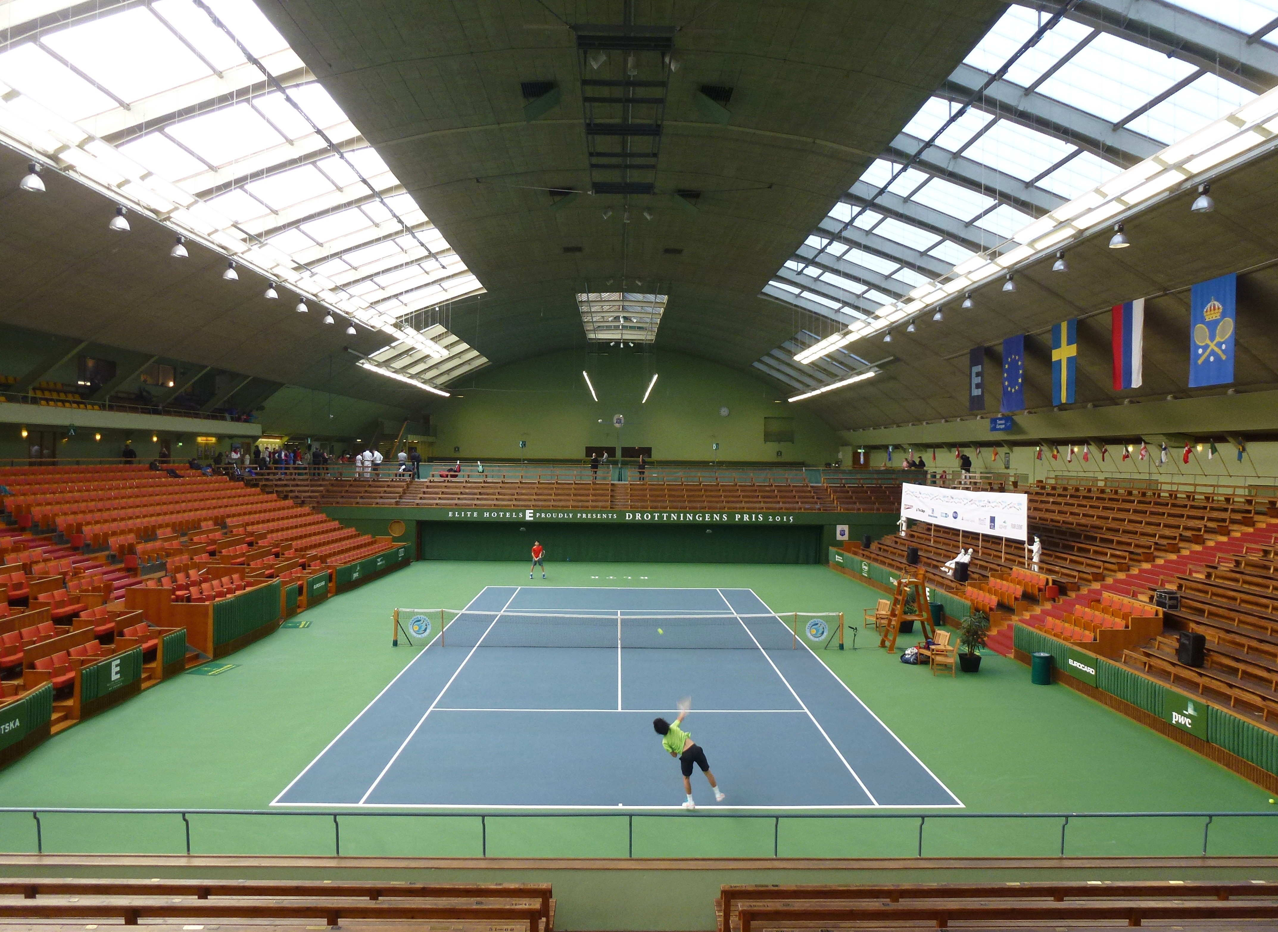 Kungliga Tennishallen, interiör